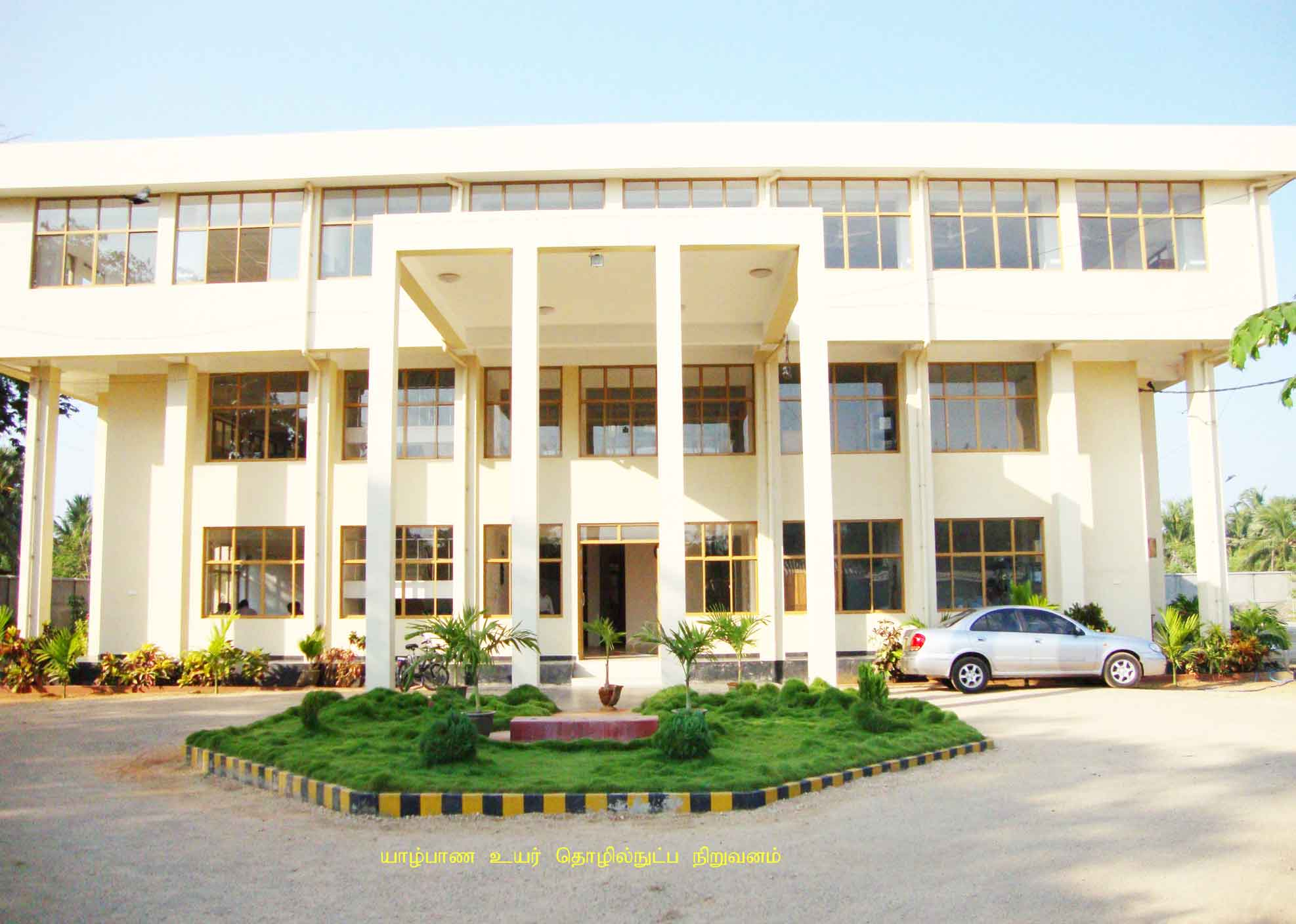 யாழ்ப்பாண உயர் தொழில்நுட்ப நிறுவனம்- இலங்கை